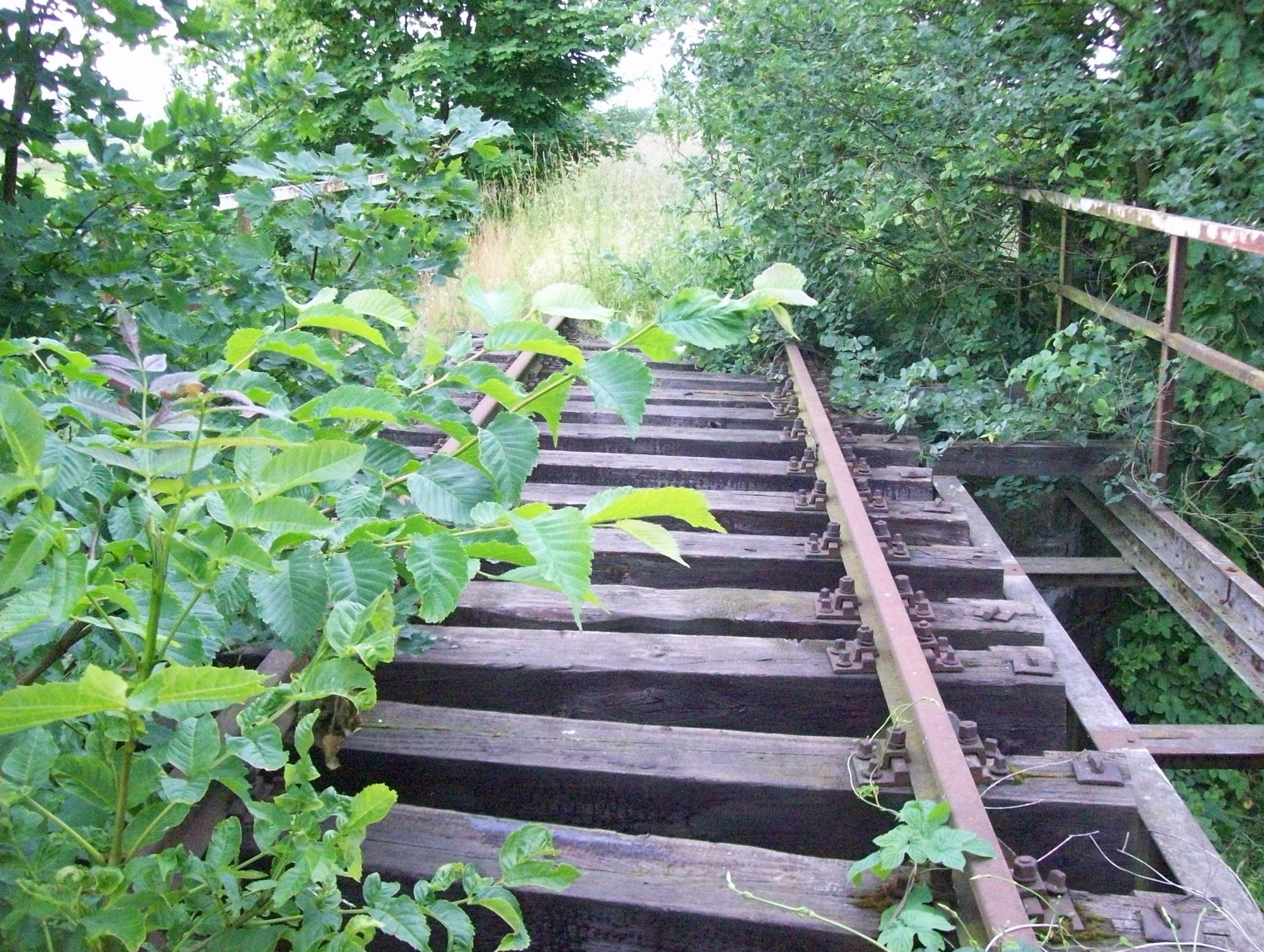 Linia kolejowa nr 410 (pozostałości) w okolicy Płotna.